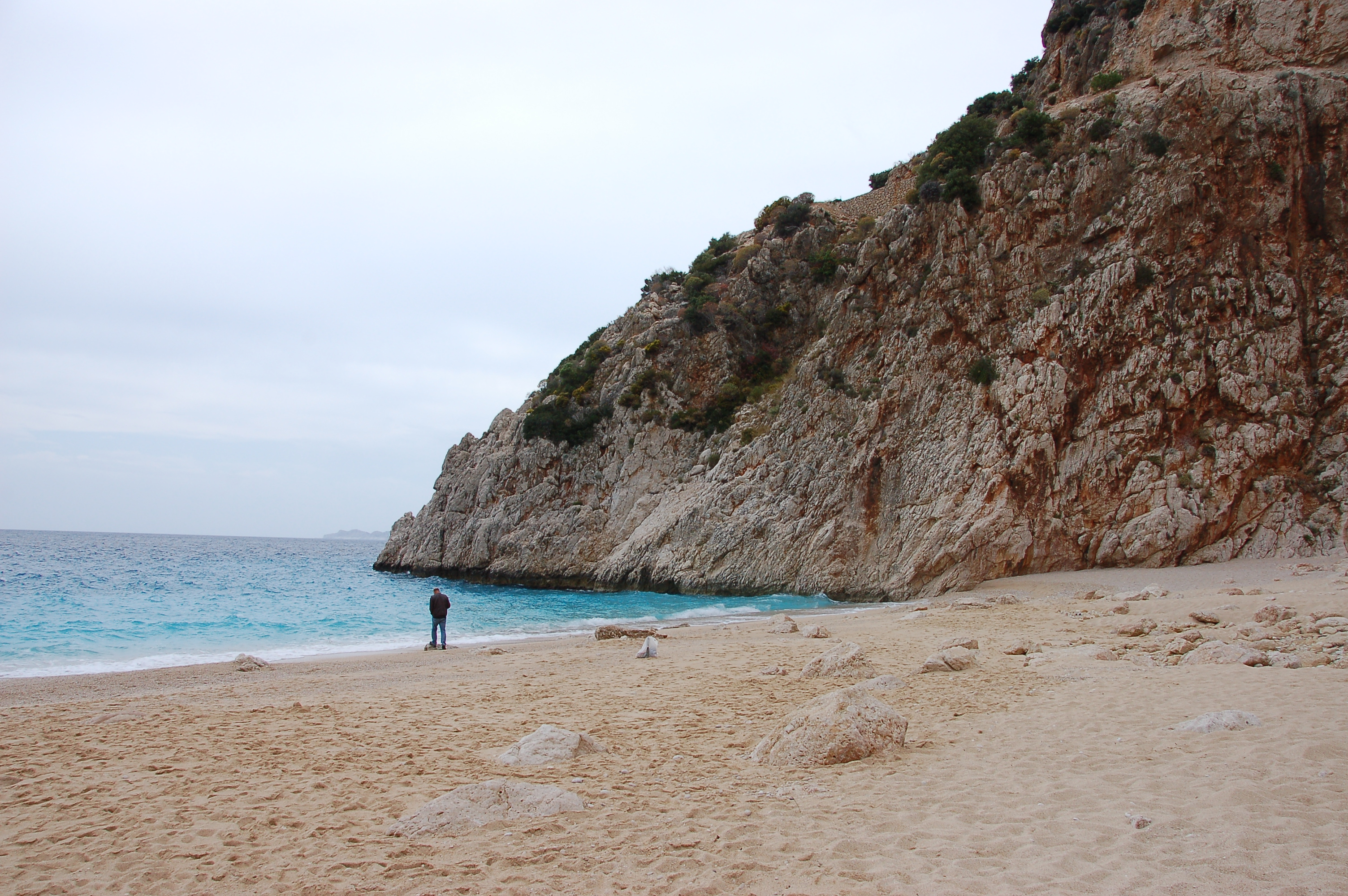 Kaputaş Beach